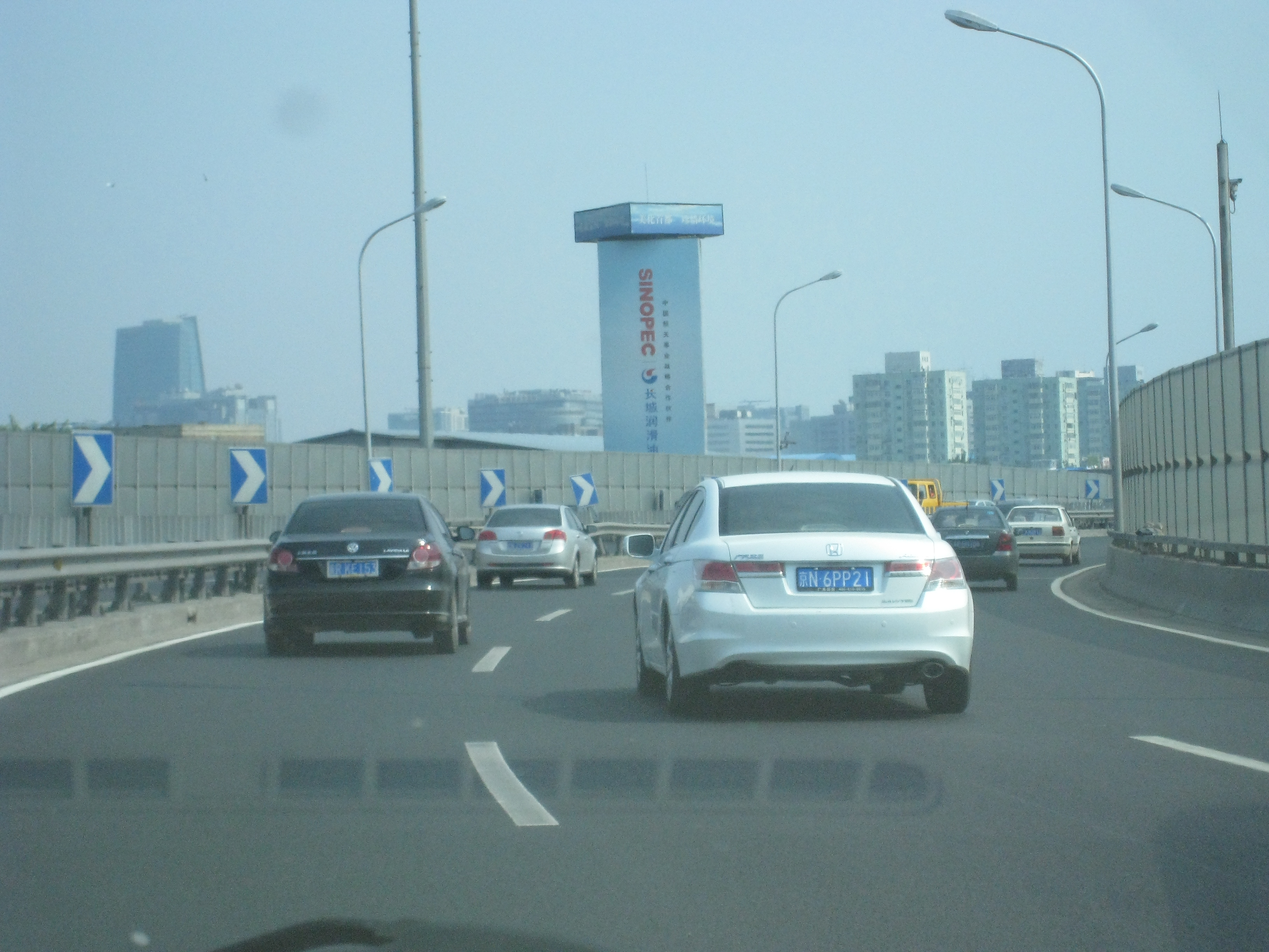 本图摄于2012年8月12日